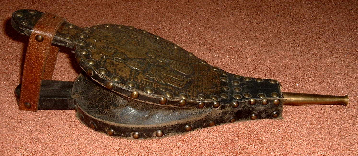 blaasbalg